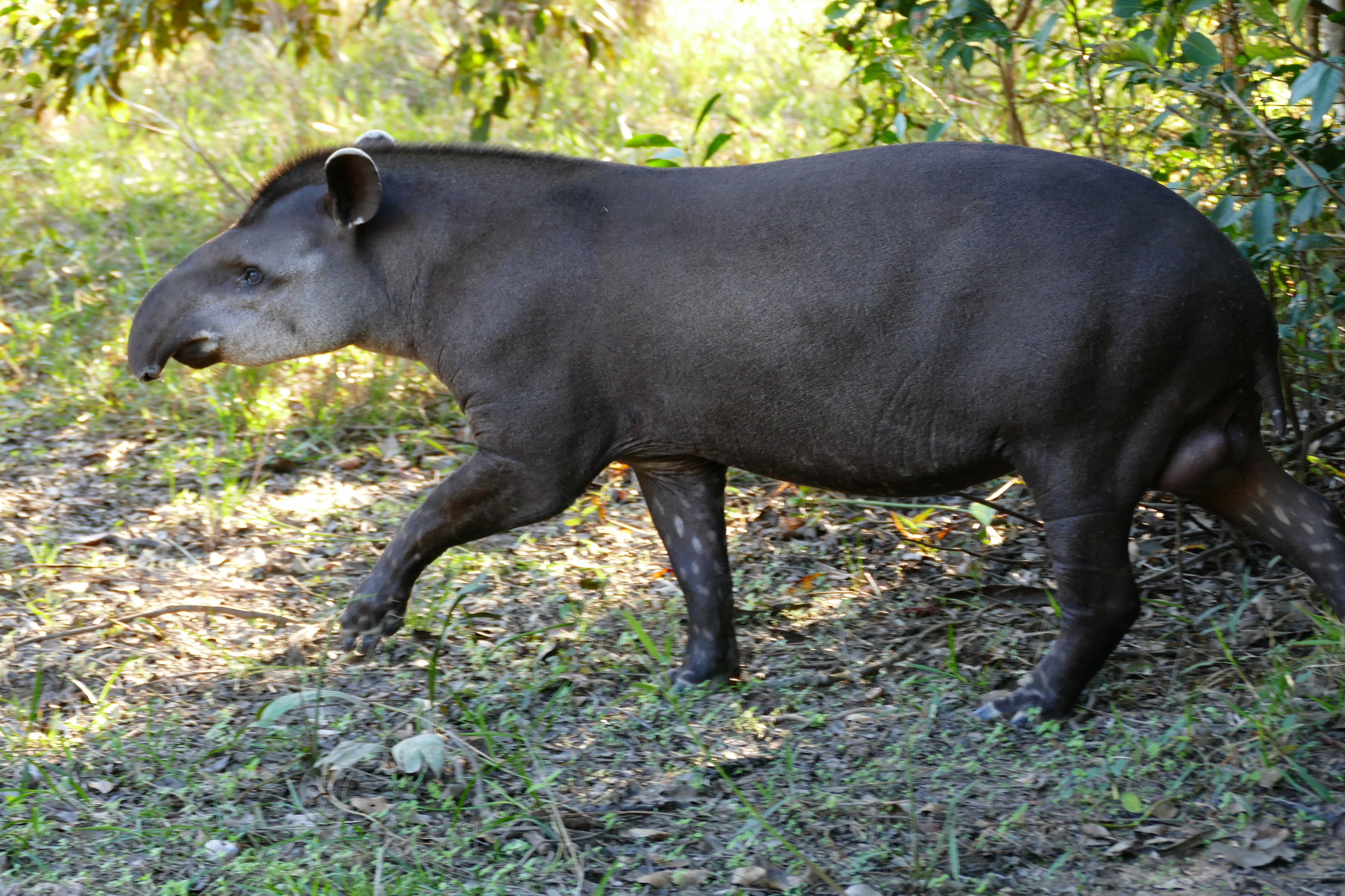 Pouso Alegre, Transpantaneira, Poconé, Mato Grosso, BRAZIL